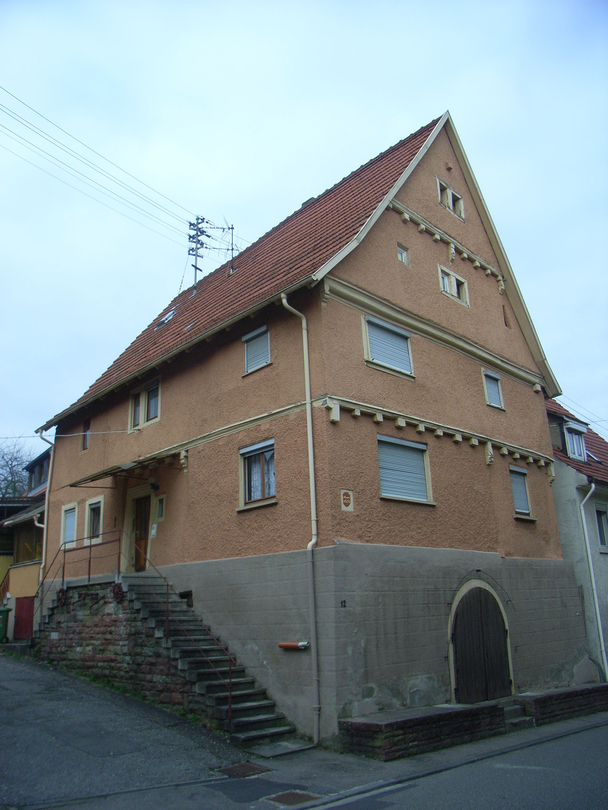 Ältestes Haus von Eschelbronn in der Oberstraße